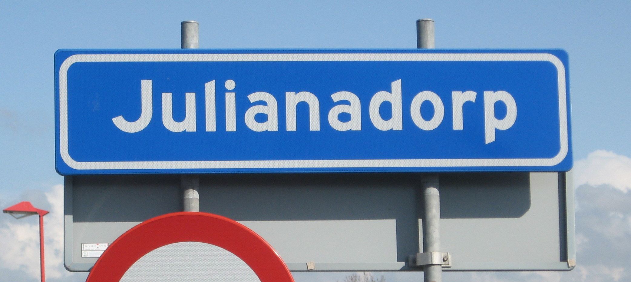 Foto van bord Julianadorp.